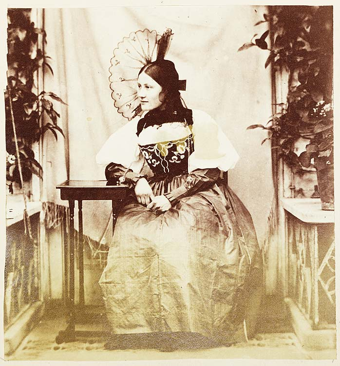 Teitl Cymraeg/Welsh title: Thereza Dillwyn Llewelyn mewn gwisg draddodiadol o'r Swisdir Ffotograffydd/Photographer: John Dillwyn Llewelyn (1810-1882) Nodyn/Note: The dress, (now in Swansea Museum) was bought by her mother, Emma Thomasina Dillwyn Llewelyn (nee Talbot) on her honeymoon in 1833. Dyddiad/Date: 185- Cyfrwng/Medium: Print taken from a collodion negative. Cyfeiriad/Reference: dil00063 (pb08732/35) Rhif cofnod / Record no.: 3590003 Rhagor o wybodaeth am Ffotograffiaeth Gynnar Abertawe yn Llyfrgell Genedlaethol Cymru More information about Early Swansea Photography at the National Library of Wales